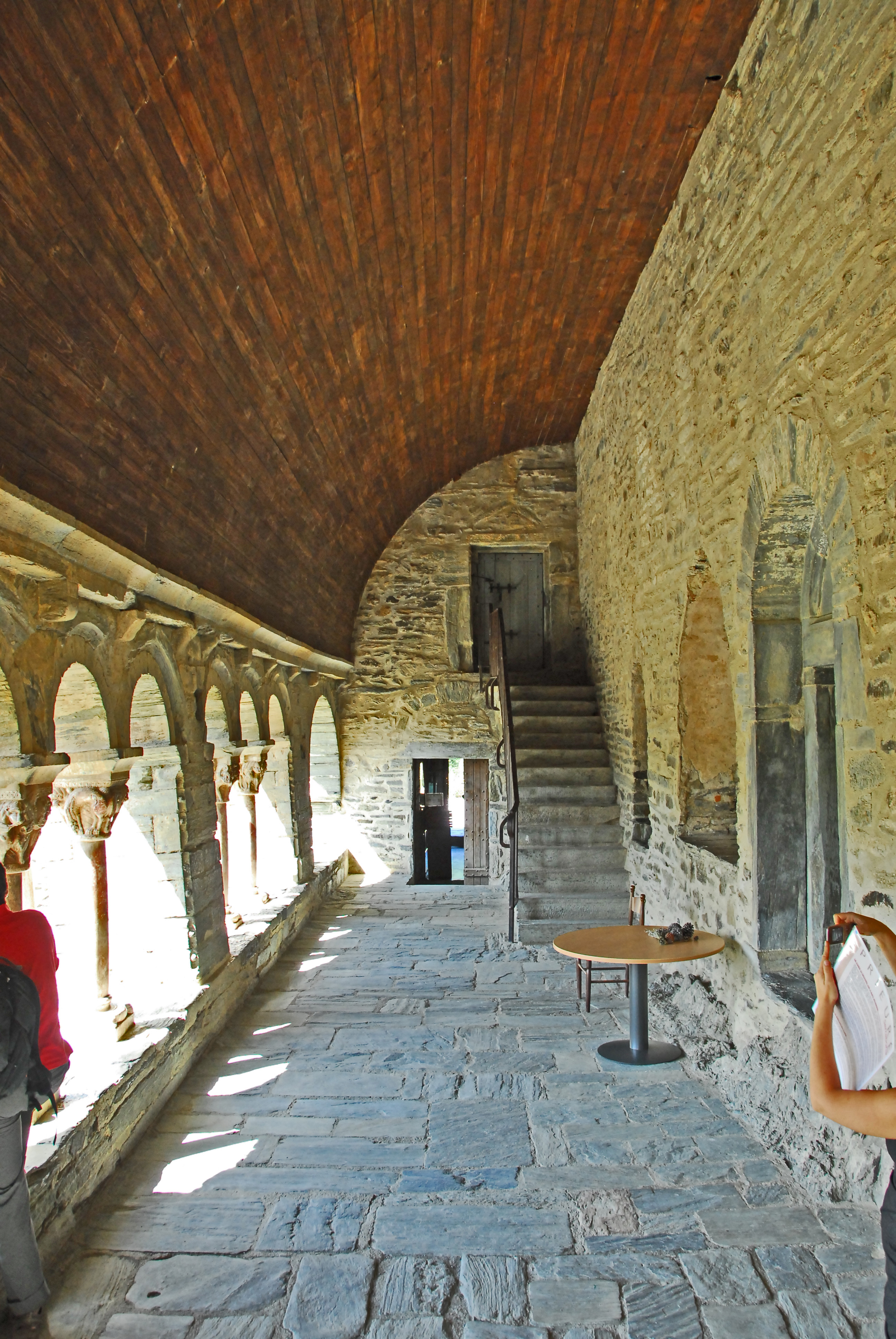 Serrabone, Kreuzgang, nach W